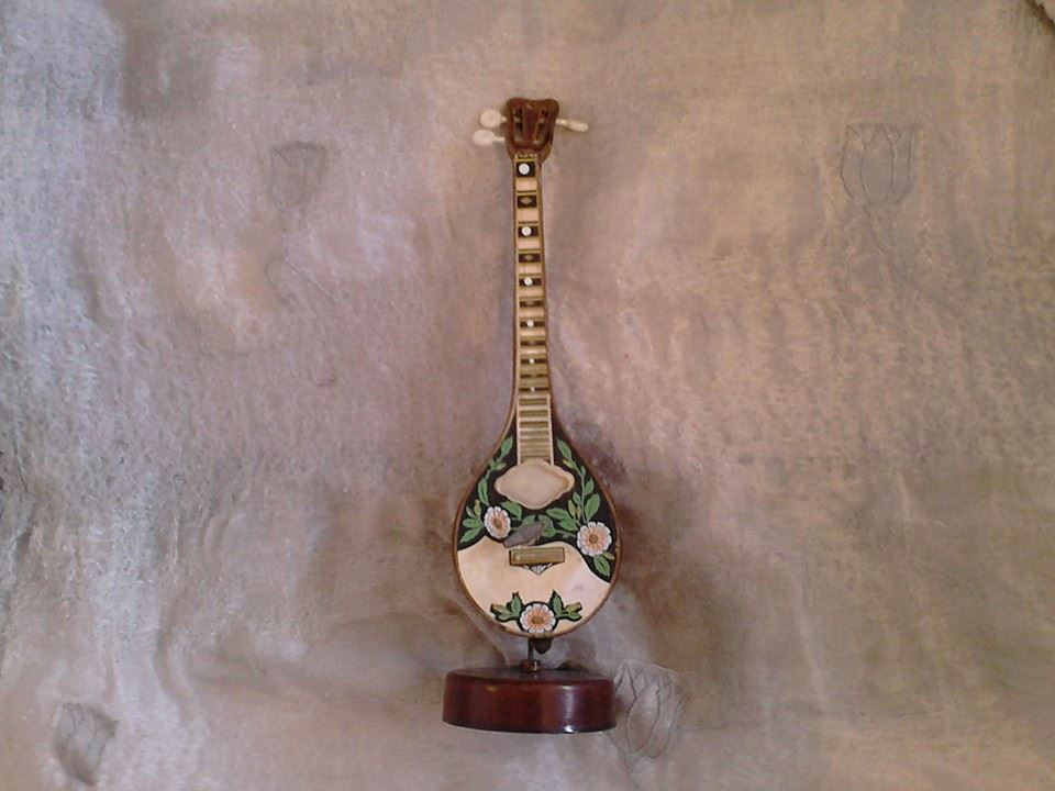 דגם מיניאטורי של בוזוקי